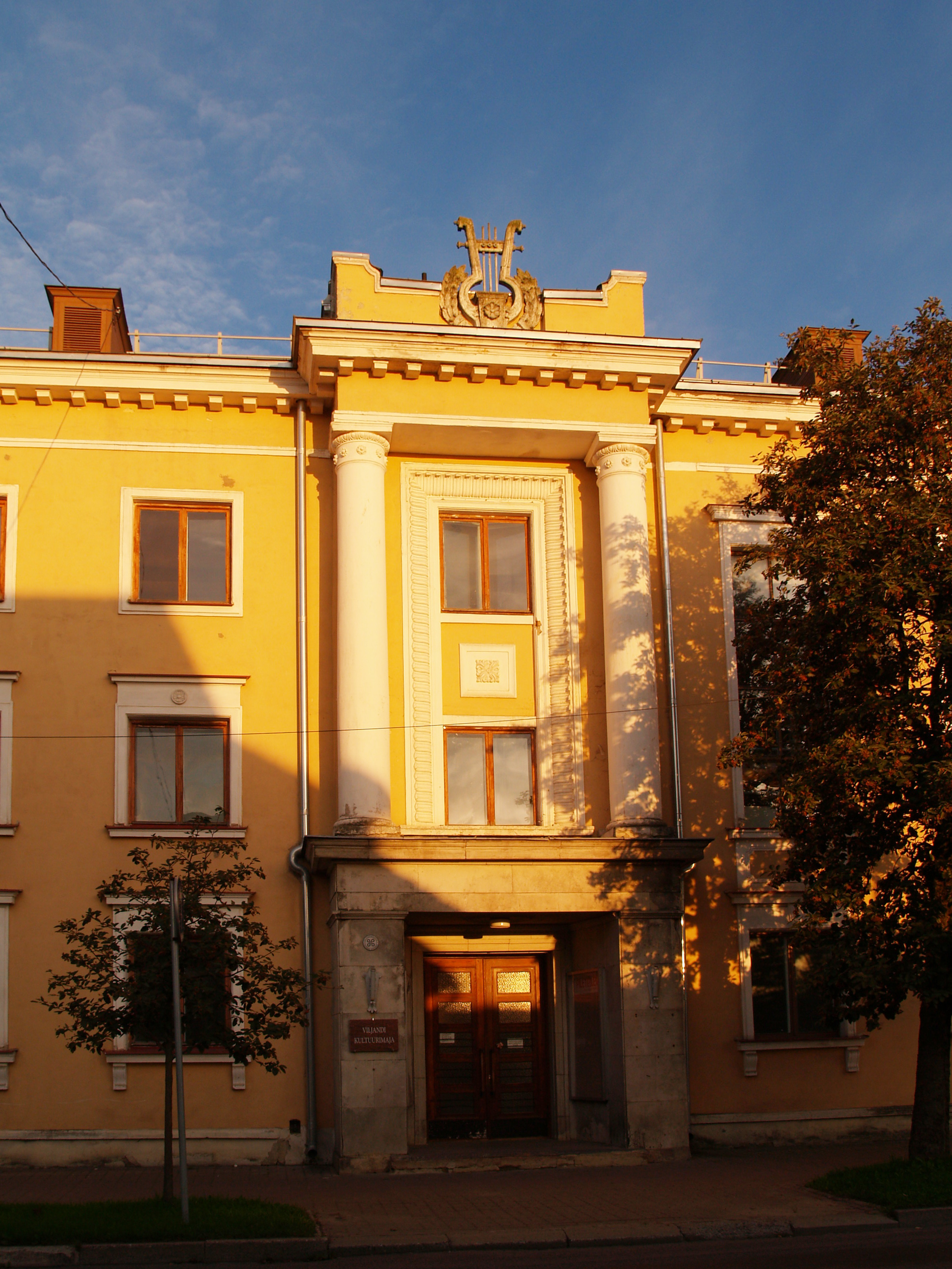 Viljandi kultuurimaja